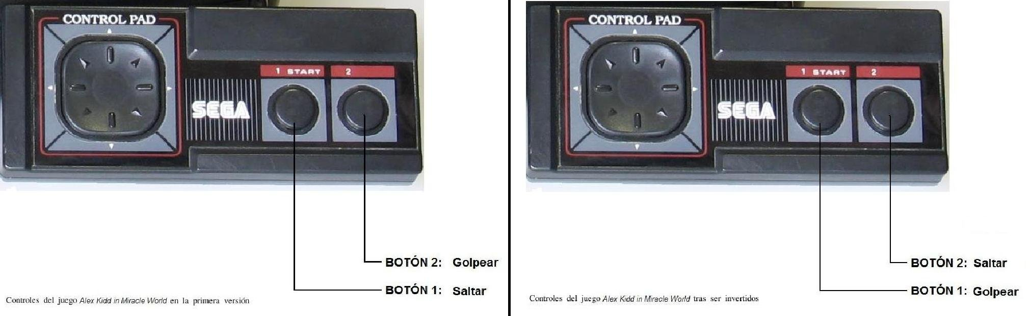 Mando Master System 2